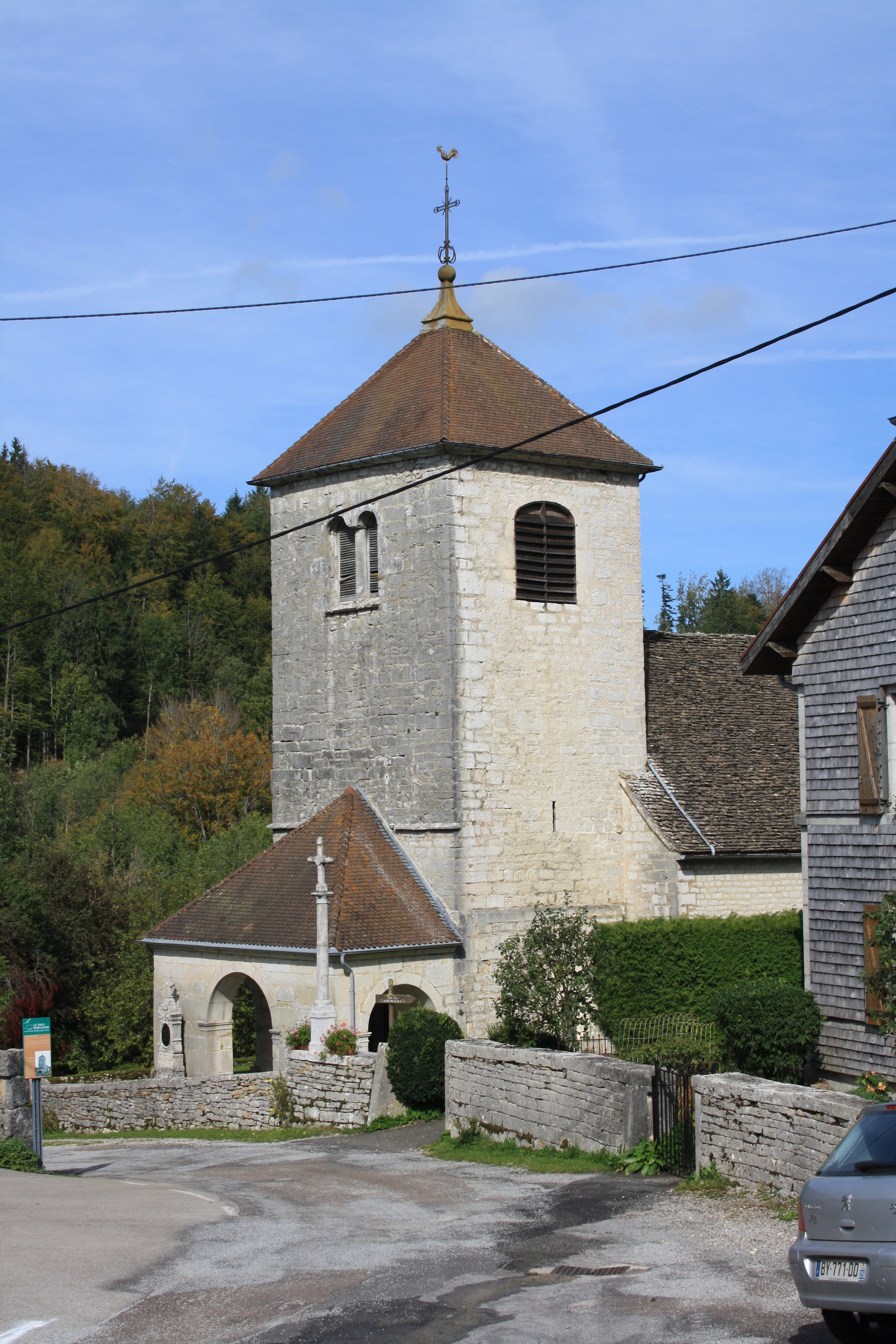 Église Saint-Maurice de Fessevillers